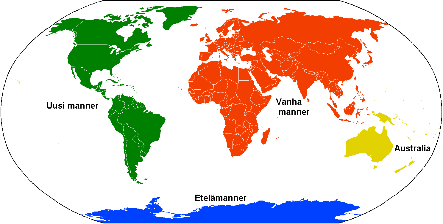 Maailman neljä mannerta mantereiden "virallisen" jaon mukaan väritettyinä. Suomennettu ja osin uudelleen väritetty Wikipedia Commonsin kuva Image:Continental models.gif